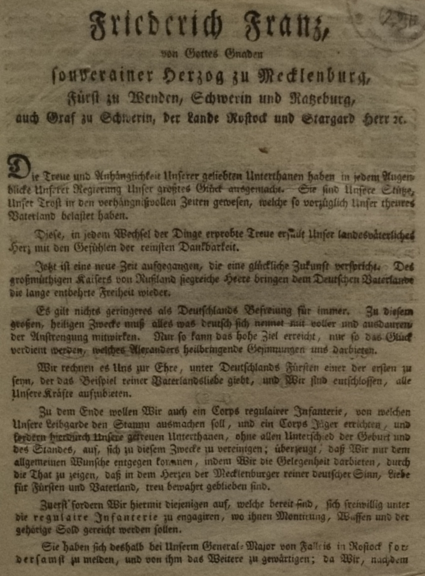 Aufruf des Herzogs von Mecklenburg-Schwerin zur Teilnahme an den Befreiungskriegen.